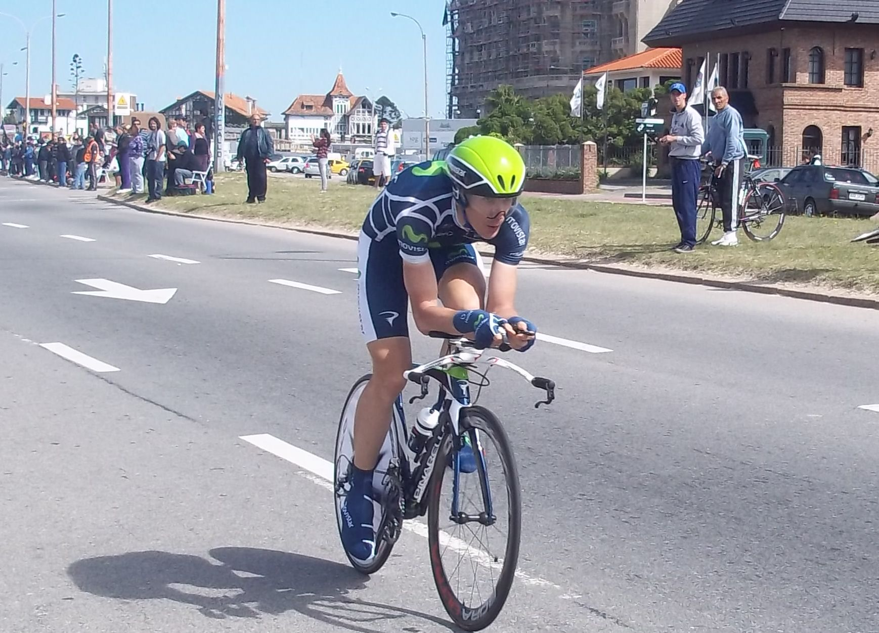 Luis Pasamontes, en la Vuelta Ciclista del Uruguay 2012